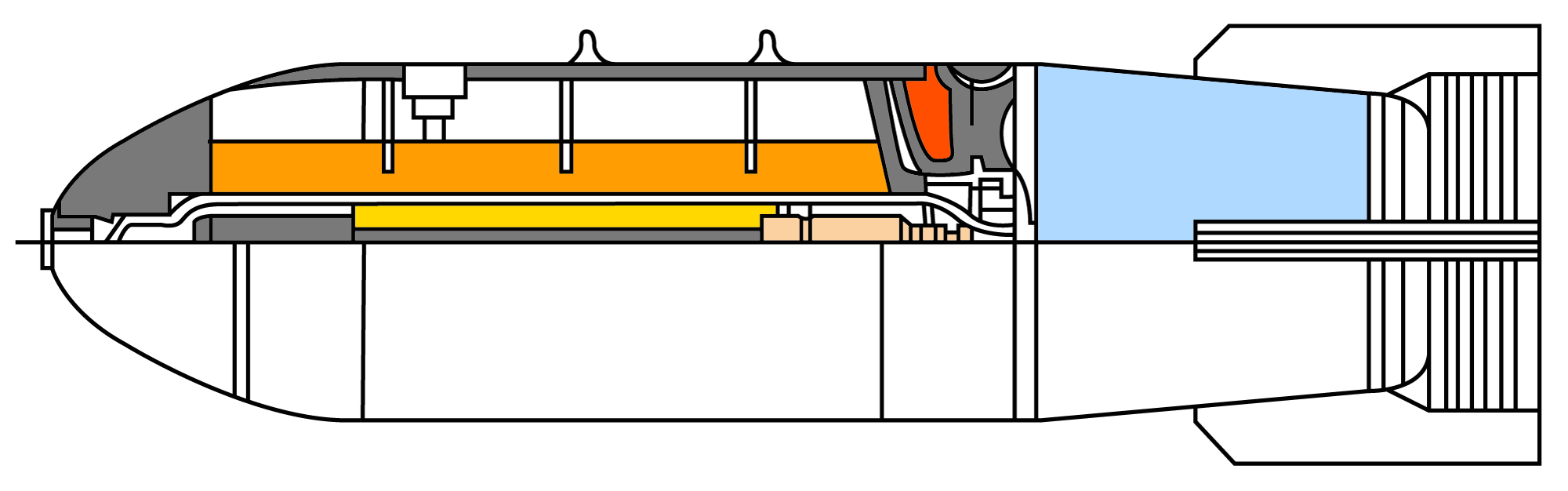 ОДАБ